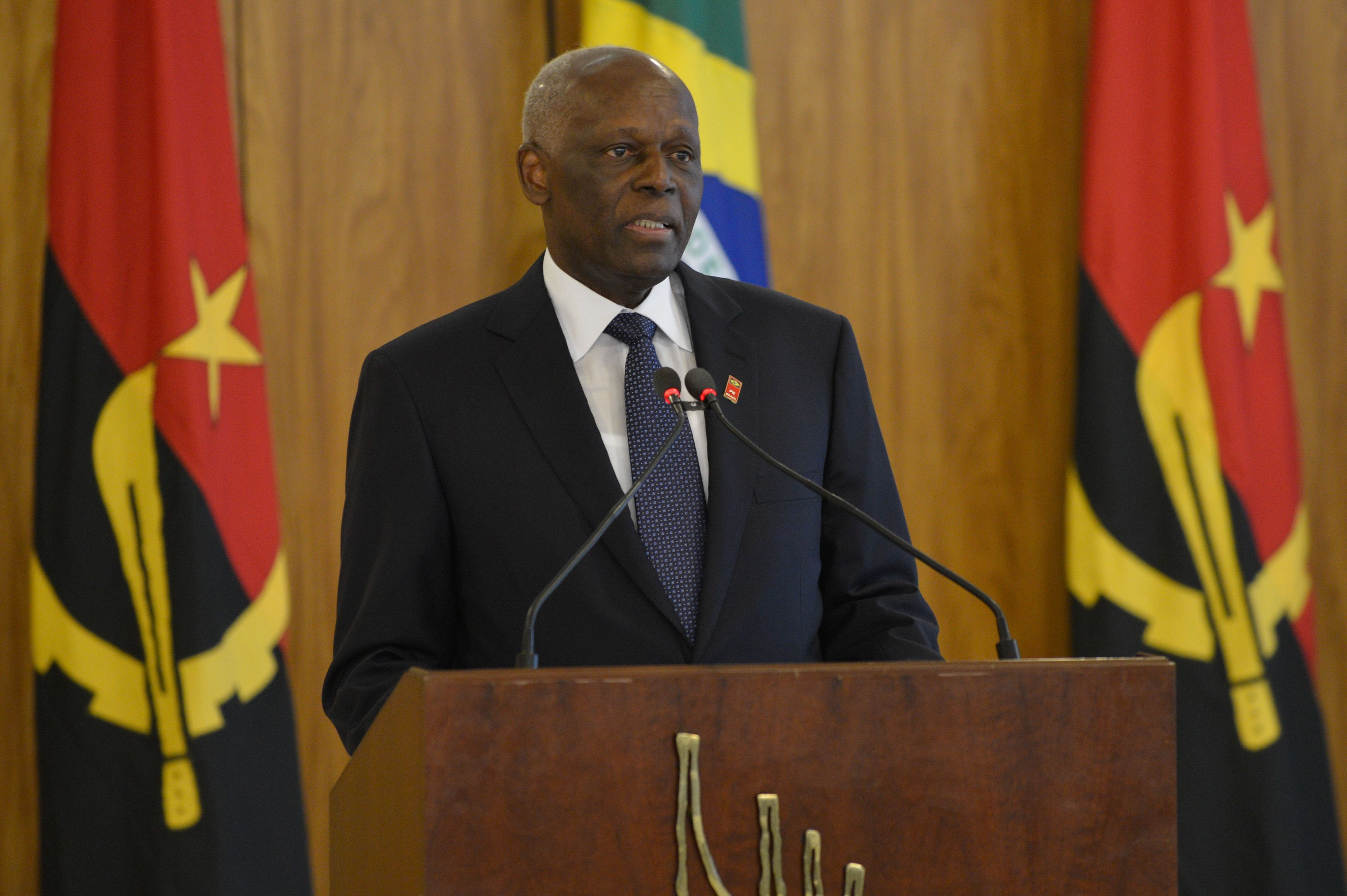 Dilma recebe o presidente de Angola, José Eduardo dos Santos